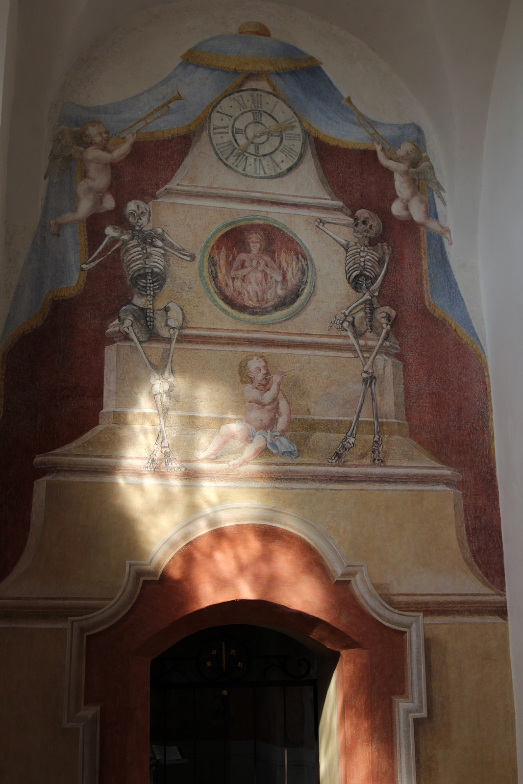 Südliche Torhalle und Eingang zur Erlöserkapelle in der Pfarrkirche St. Laurentius Altheim, OÖ